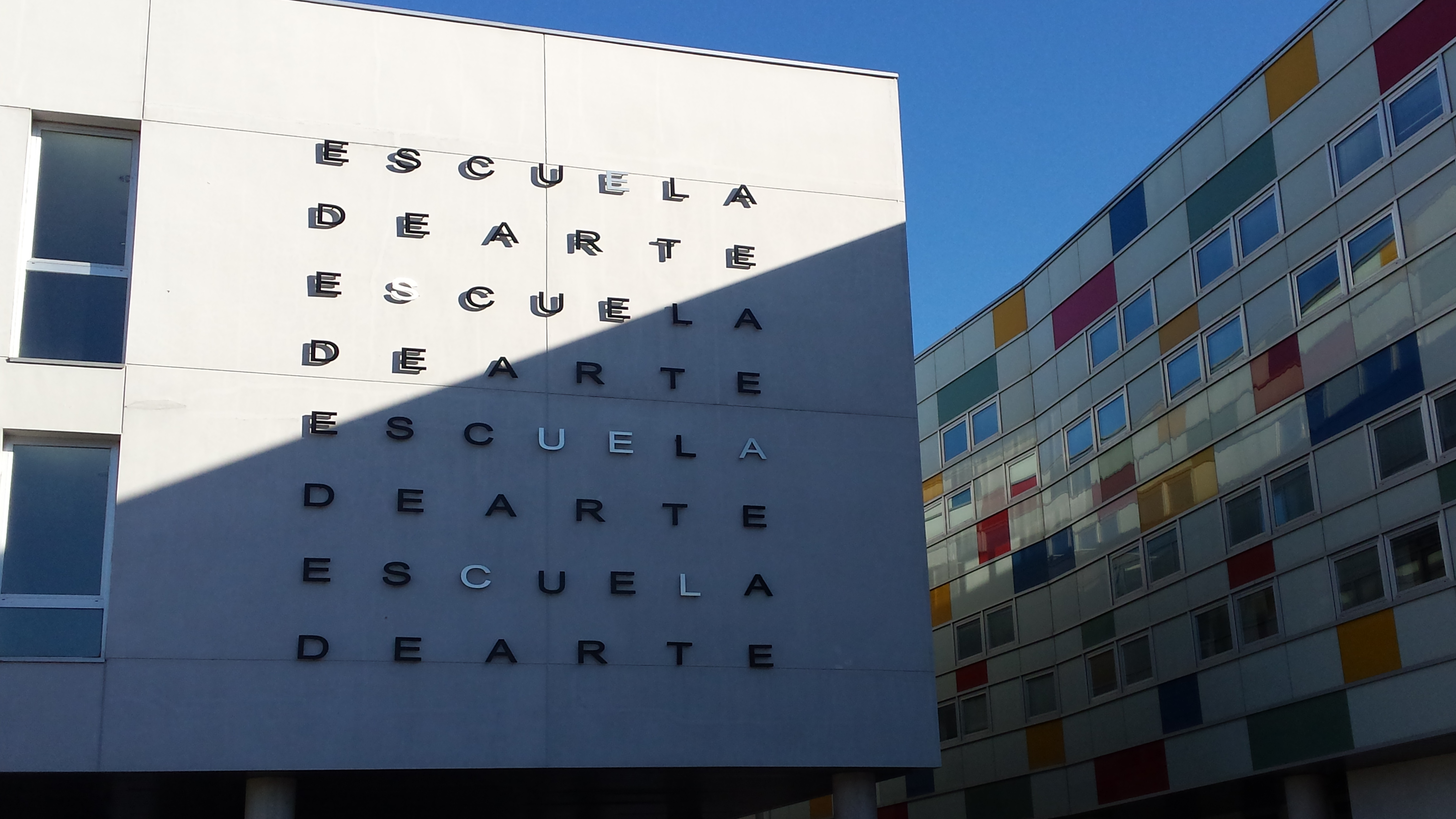 Moderno edificio de la Escuela de Arte de Albacete